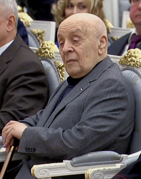 Народный артист СССР Леонид Броневой на церемонии вручения государственных наград в Кремле, 22 декабря 2014 года.